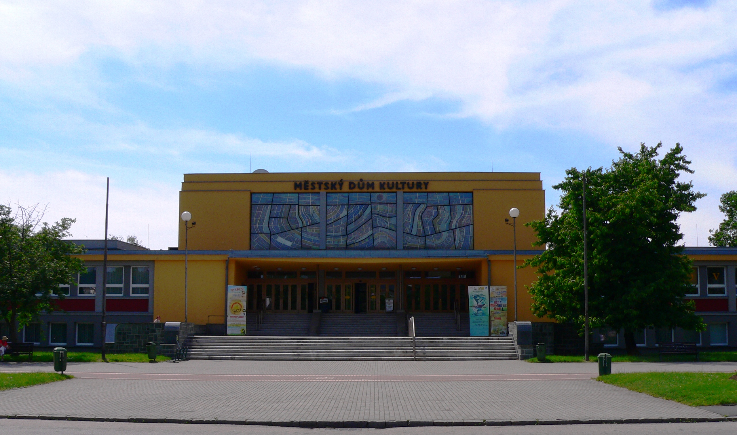 Městský dům kultury, Karviná-Nové Město.